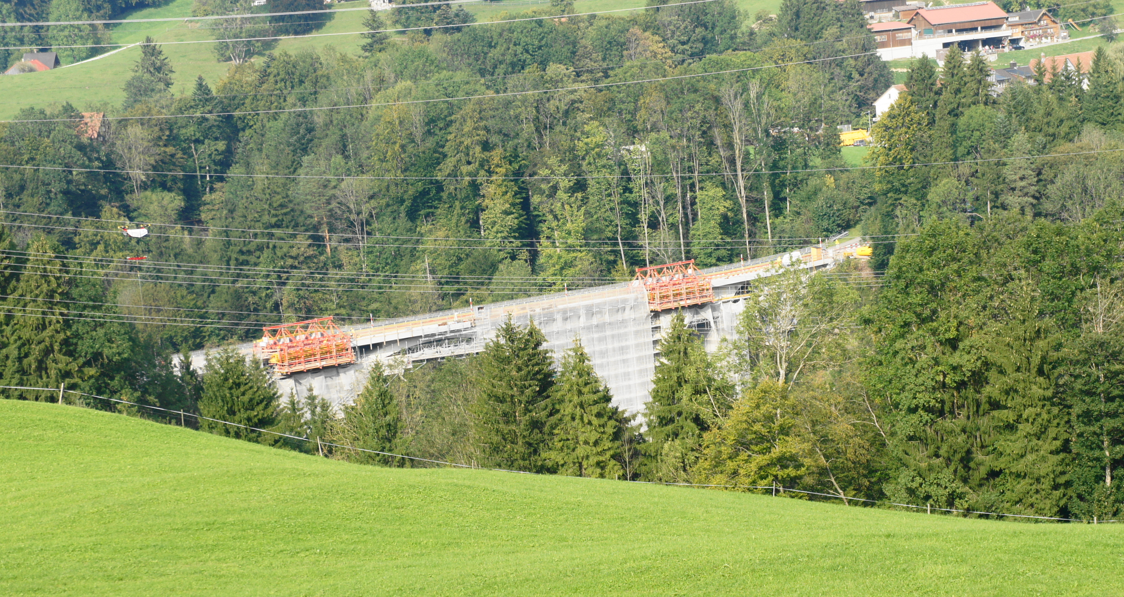 Die Gmündertobel-Brücke von Südwesten, Seite Stein AR, Blickrichtung Teufen AR, die Brücke ist mit einem Baugerüst versehen und nur einspurig befahrbar